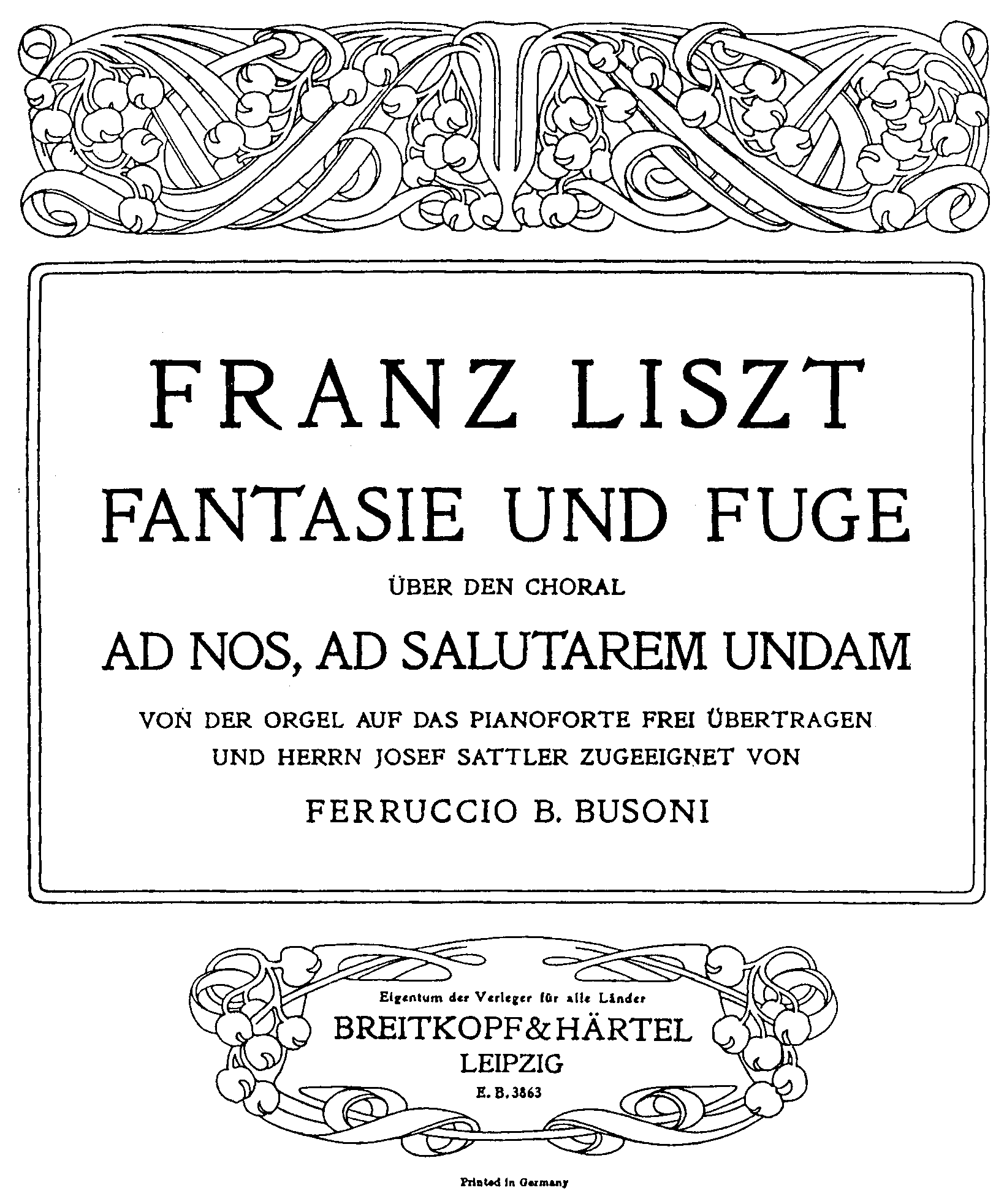 Franz Liszt, Fantasie et Fugue sur le choral « Ad nos, ad salutarem undam » (arr. Feruccio Busoni) publiée par Breitkopf & Härtel (1897)